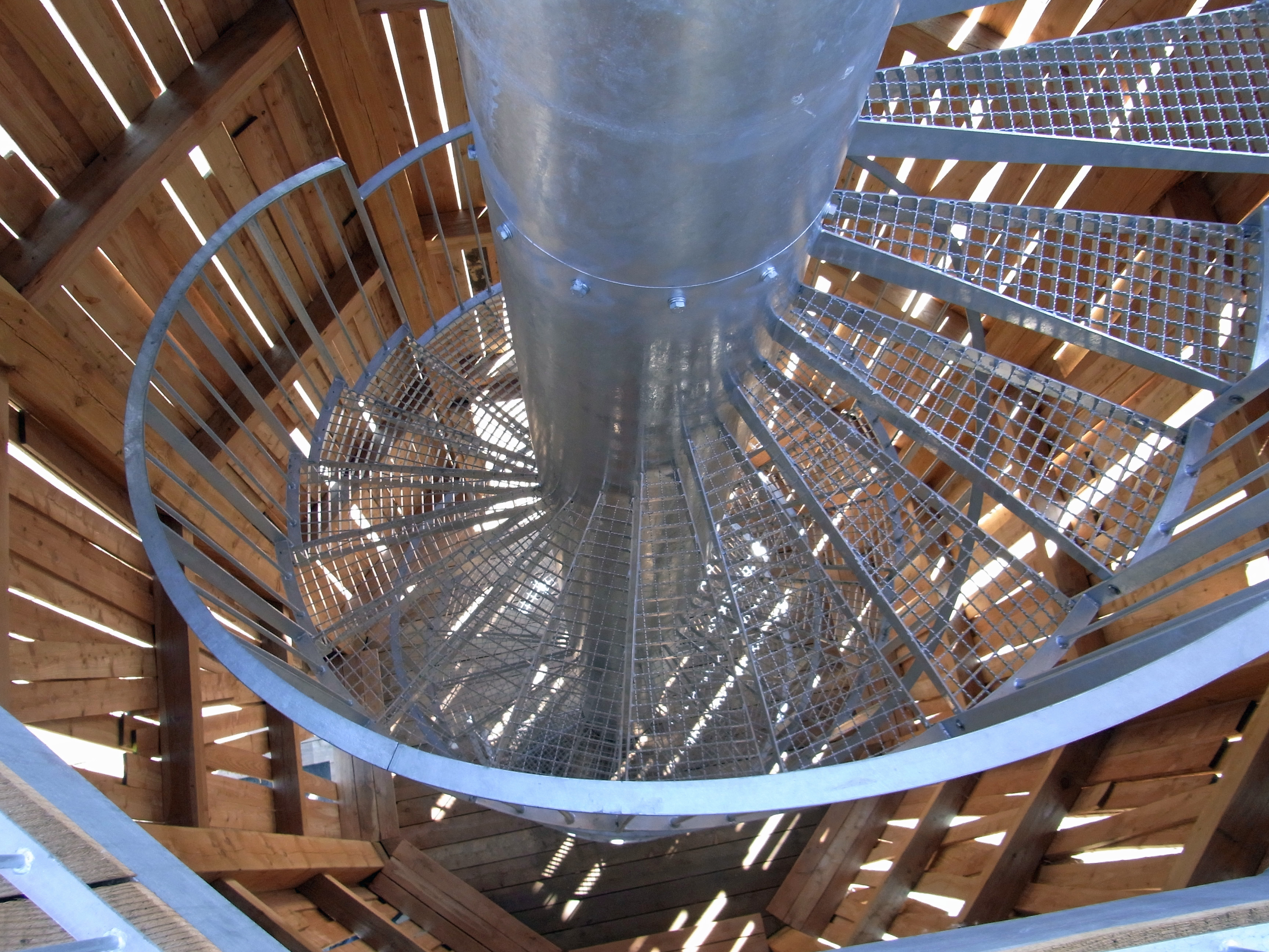 Emscherkunst.2010 Tadashi Kawamata: Walkway and Tower